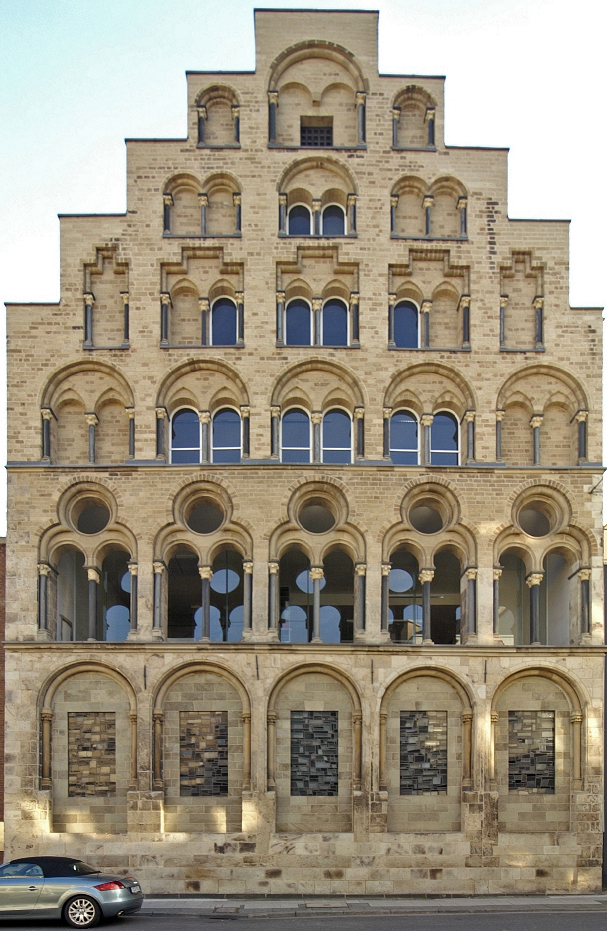 Das Overstolzenhaus in der Kölner Altstadt-Süd, Rheingasse 8. Baudenkmal 124